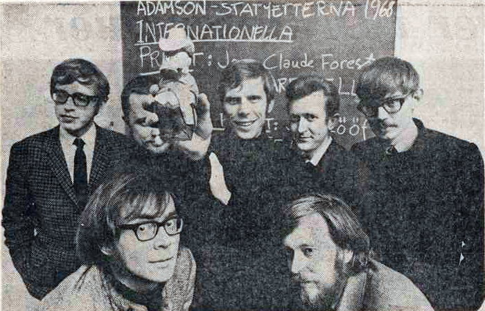 Bildtext i Dagens Nyheter 1968-12-07 (s. 17): "Svenska Seriekademin hade på fredag sin fjärde utdelning av den hiskligt fula och blåa Adamsonstatyetten till en utländsk och en svensk serieakademisk "Nobelpristagare". Fransmannen Jean-Claude Forest belönades för sin psykedeliskt flotta Barbarella och Jan Lööf i DN och Sydsvenskan för figuren Felix. Alla de aderton i akademin var inte med om valet. Men debatten om förtjänstfullaste konstnärer var livlig. Deltagarna var: Stående fr v Peter Lundberg, Sven Lagerström, Sture Hegerfors, Stellan Nehlmark, Janne Lundström. På knä för DN:s fotograf: Ludvig Rasmusson och Bosse Karlsson."